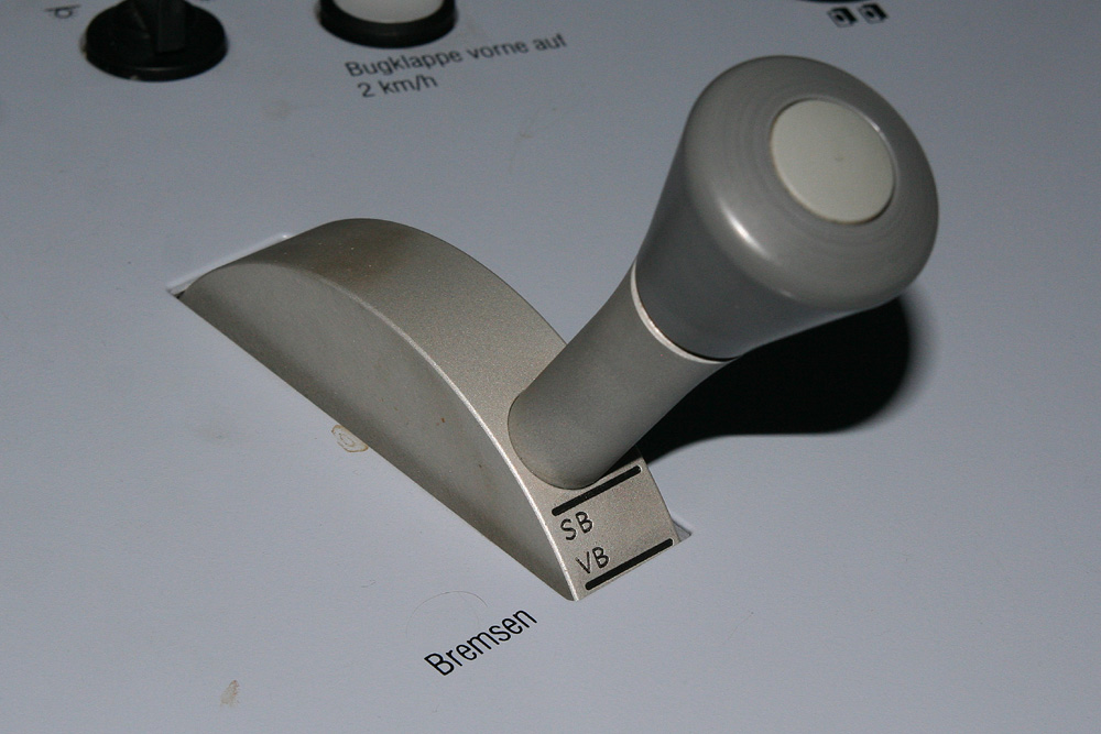 Hebel für das Führerbremsventil eines ICE-T in Vollbremsstellung